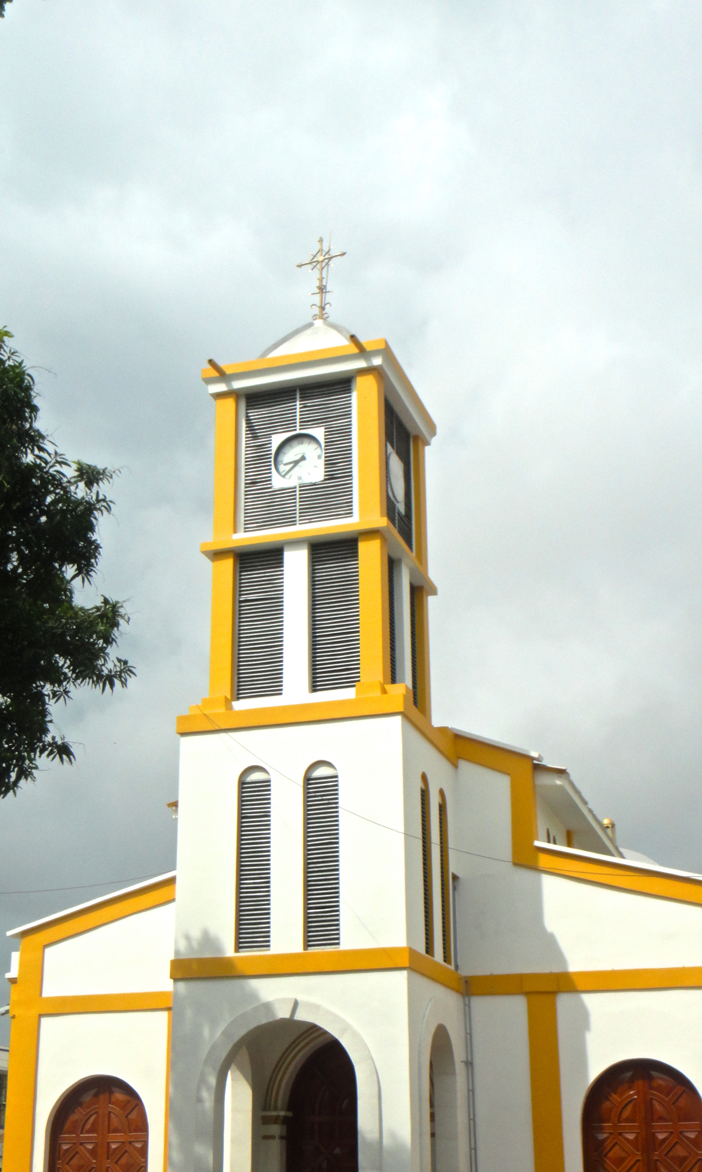 Ubicación: ARAUCA, ARAUCA